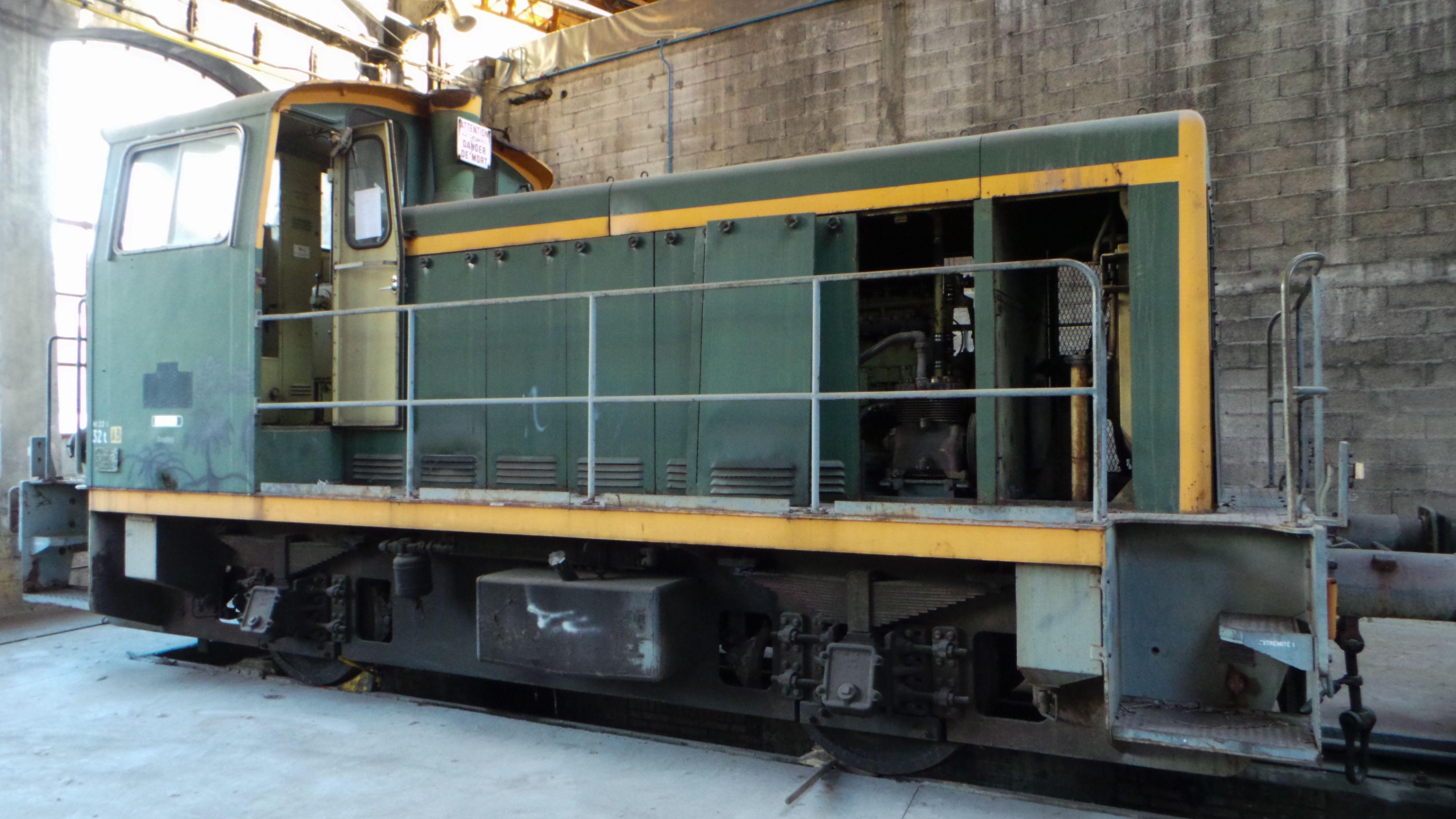 Locotracteur Y7504 dans la rotonde du dépot SNCF de Chambéry / Chambéry, Savoie, France